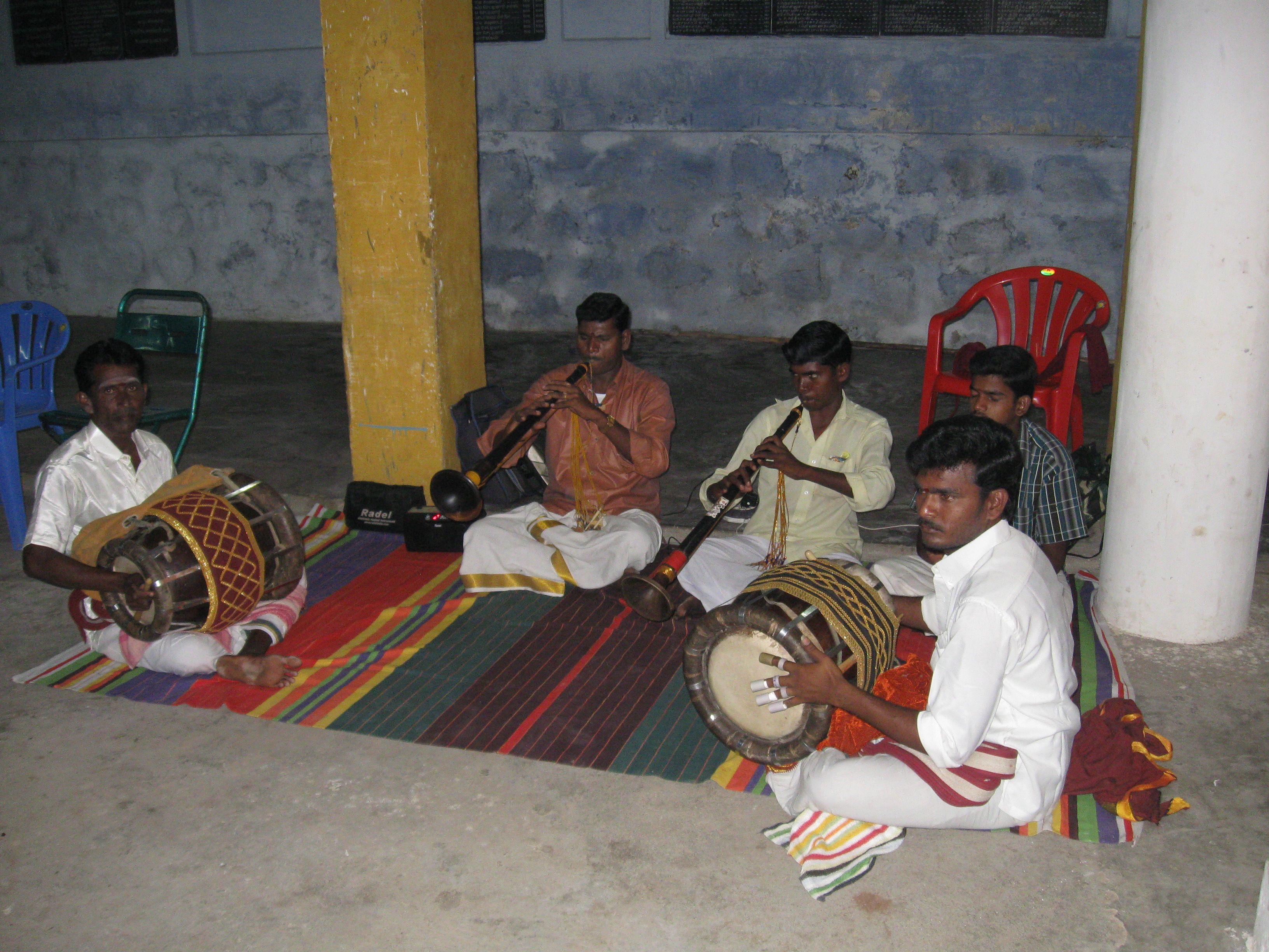 திருமணத்தில் வாசிக்கப்படும் நாதசுரம்